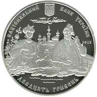 До 200-річчя С. Гулака-Артемовського аверс